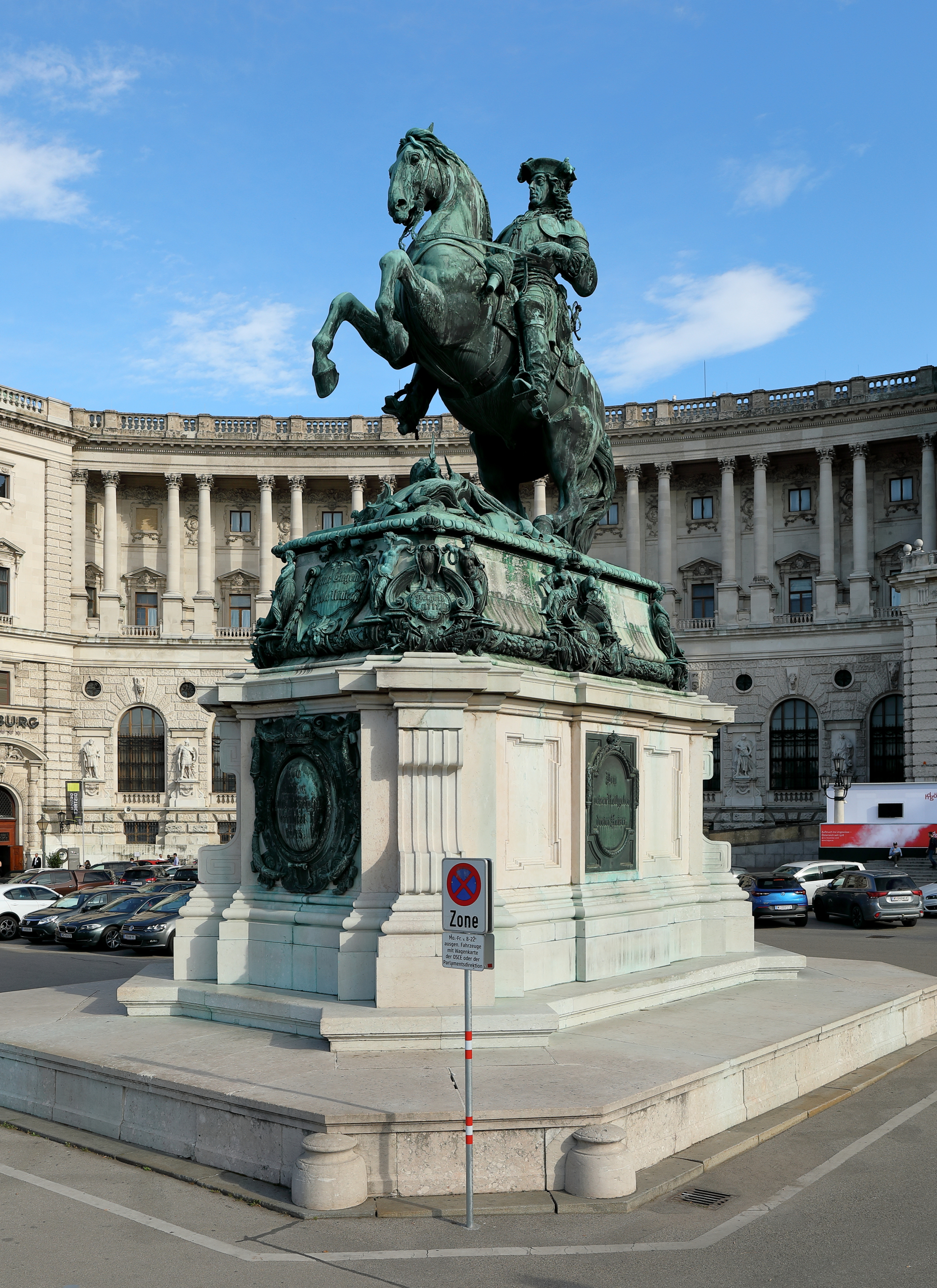 Das Prinz-Eugen-Denkmal am Heldenplatz im 1. Wiener Bezirk Innere Stadt und im Hintergrund die Neue Hofburg.Das bronzene Reiterstandbild auf einem Postament aus geschliffenem und poliertem Untersberger Marmor stellt den Prinz Eugen von Savoyen dar und wurde am 18. Oktober 1865 enthüllt. Den Auftrag dazu erhielt 1860 der Bildhauer Anton Dominik von Fernkorn und nachdem dieser um 1862 erkrankte, erfolgte die Fertigstellung weitgehend von seinem Schüler Franz Pönninger. Die Zeichnung zu den Ornamenten stammt von Eduard van der Nüll und die Steinmetzarbeiten führten Krammer und Josef Budowitz aus.